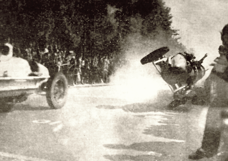 Imagem do acidente da piloto francesa Hellé Nice em São Paulo, Brasil, durante o primeiro Grande Prêmio daquela cidade.